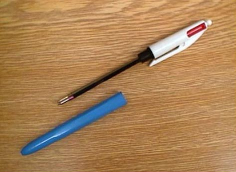 Stylo à bille de marque Bic, à deux couleurs : rouge et bleu outremer (vu démonté).